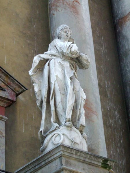 Kościół Franciszkanów w Przemyślu. Najświętsza Maria Panna. Rzeźba autorstwa Fabiana Fesingera.